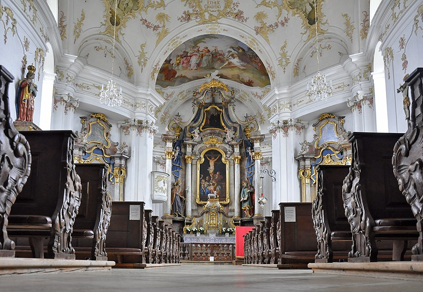 Pfarrkirche Berbling, Innenansicht